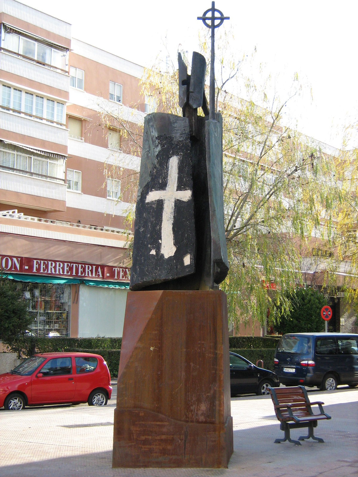 Estatua en homenaje a San Nicasio, situada en el barrio homónimo de Leganés (Comunidad de Madrid).